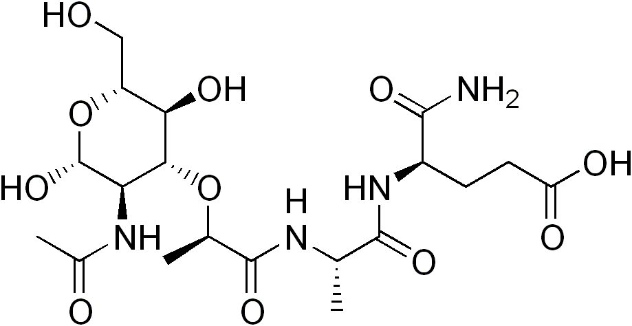 chemical structure of muramyl dipeptide